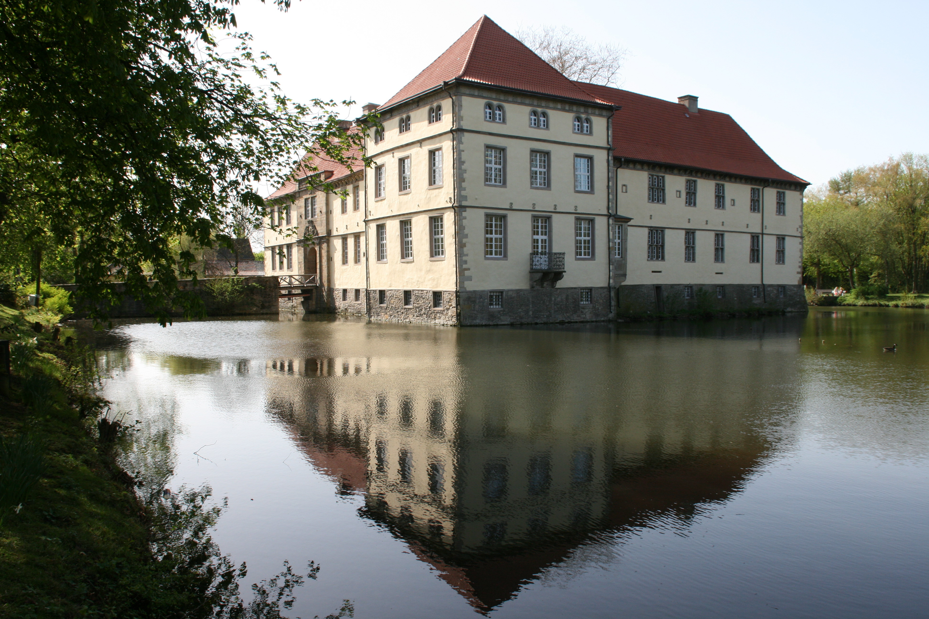 Schloss Strünkede, Karl-Brandt-Weg 5, Schlosspark Strünkede in Herne